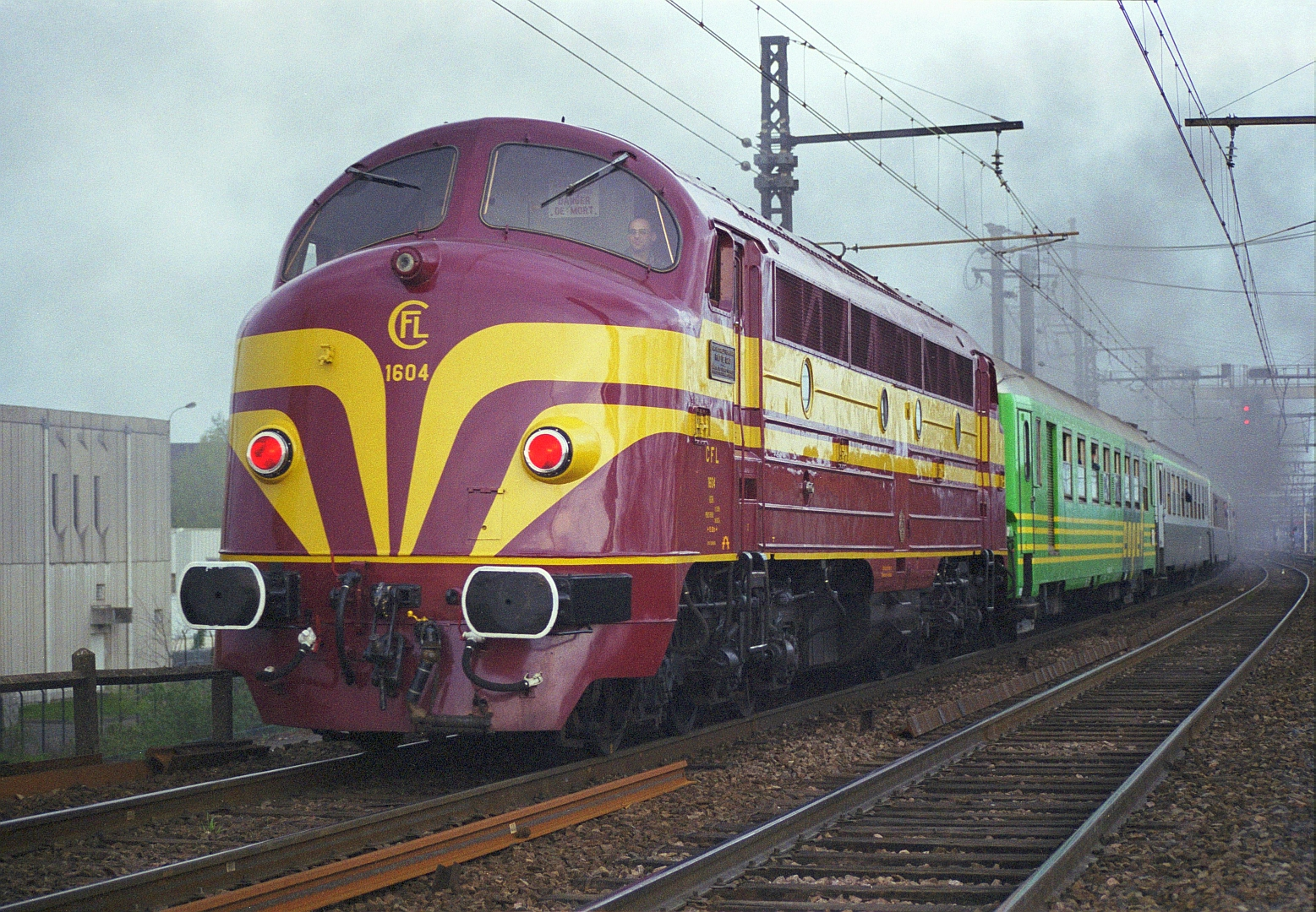 La CC NOHAB 1604 sur la Grande-Ceinture à Villeneuve-Saint-Georges, lors de sa venue à Paris le 30 mars 2002.